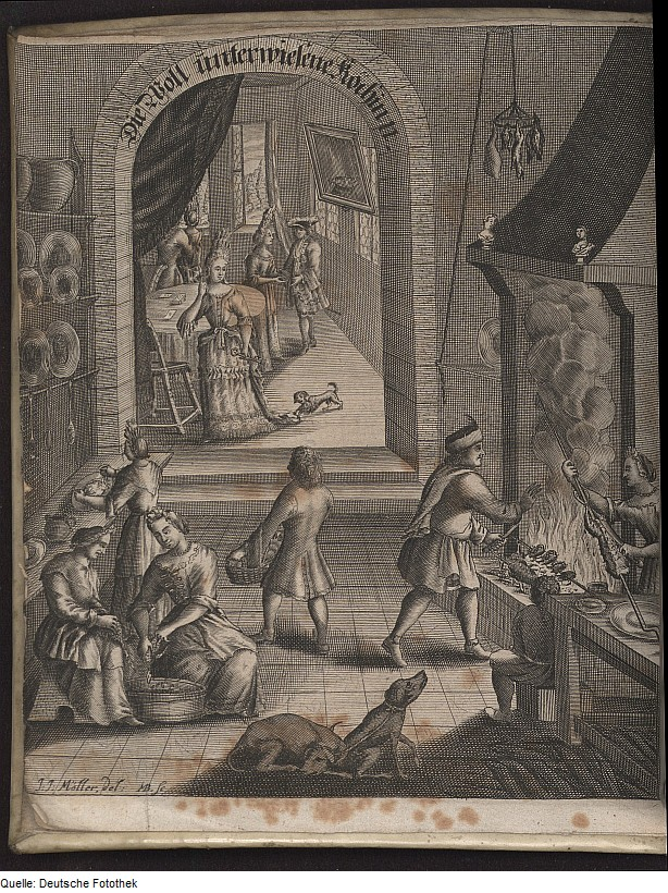 Original image description from the Deutsche Fotothek Küche & Kochen & Backofen